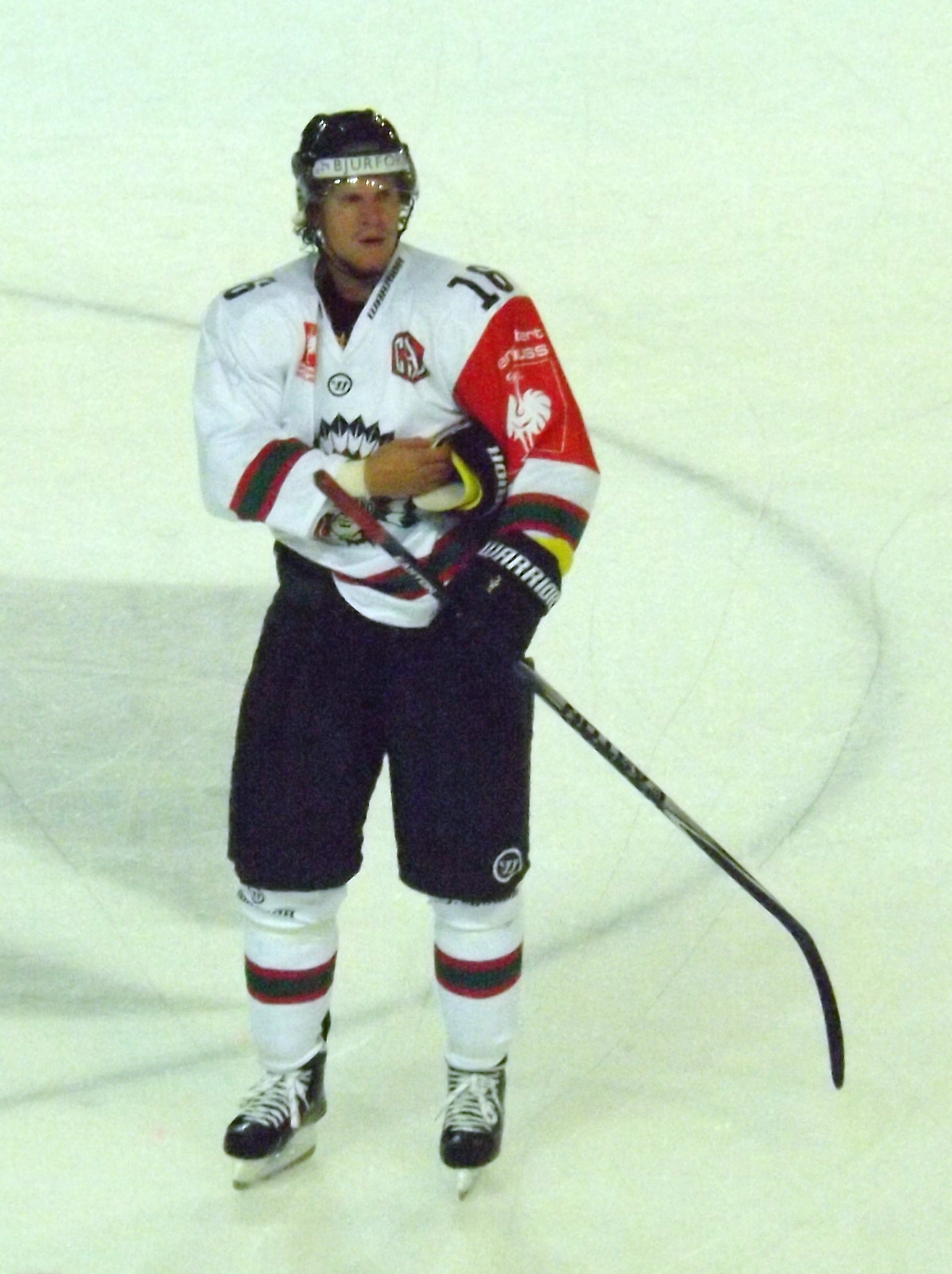 Joueur de hockey sur glace Frölunda Indians, CHL 2014